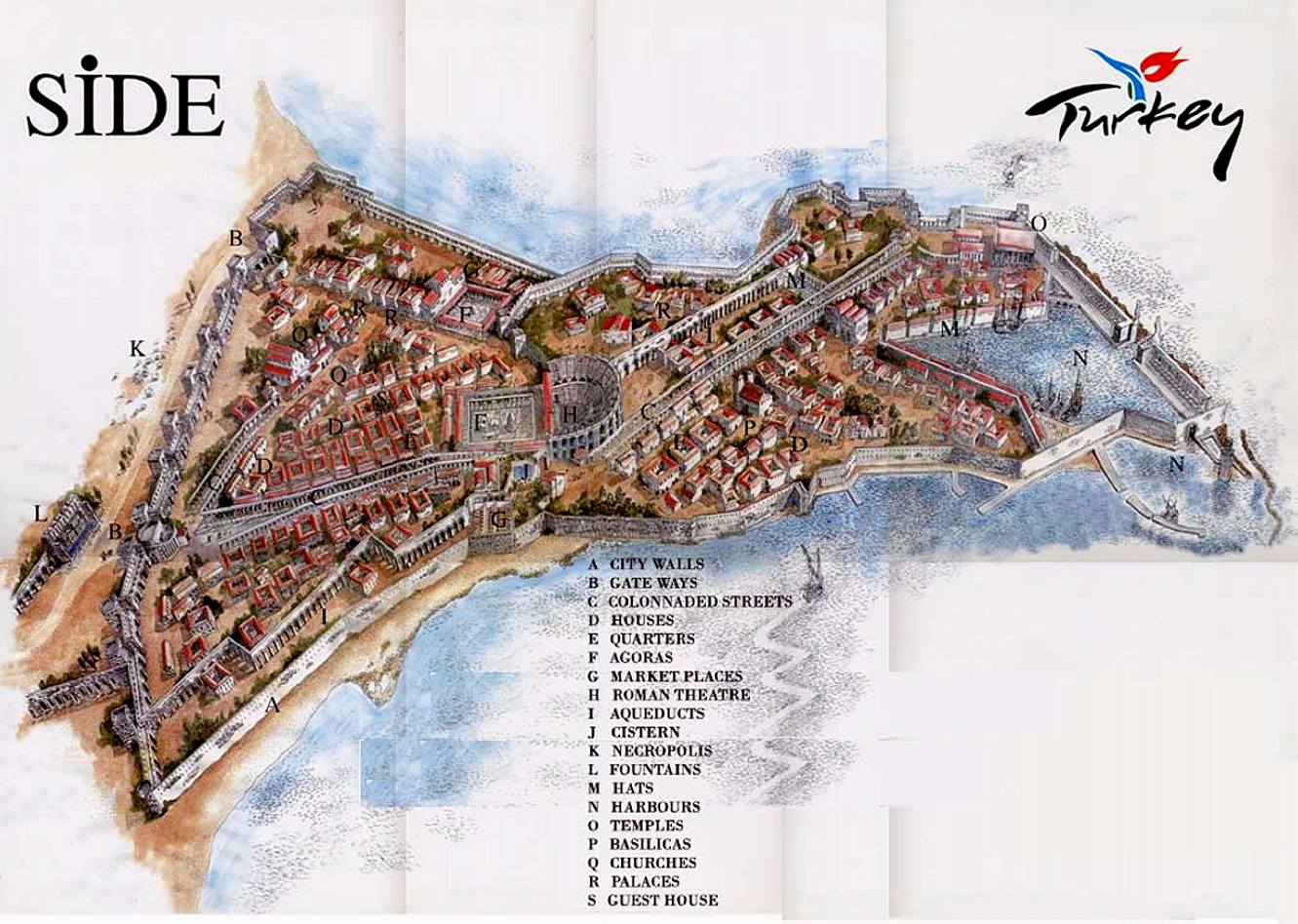 Zeichnerische Rekonstruktion – die Einzelheiten entspringen der Fantasie des Grafikers